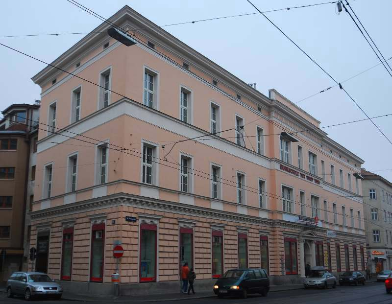 Musikschule der Stadt Wien in der Thaliastraße 44 in Wien-Ottakring, früher Kronprinzessin Stephanie-Spital